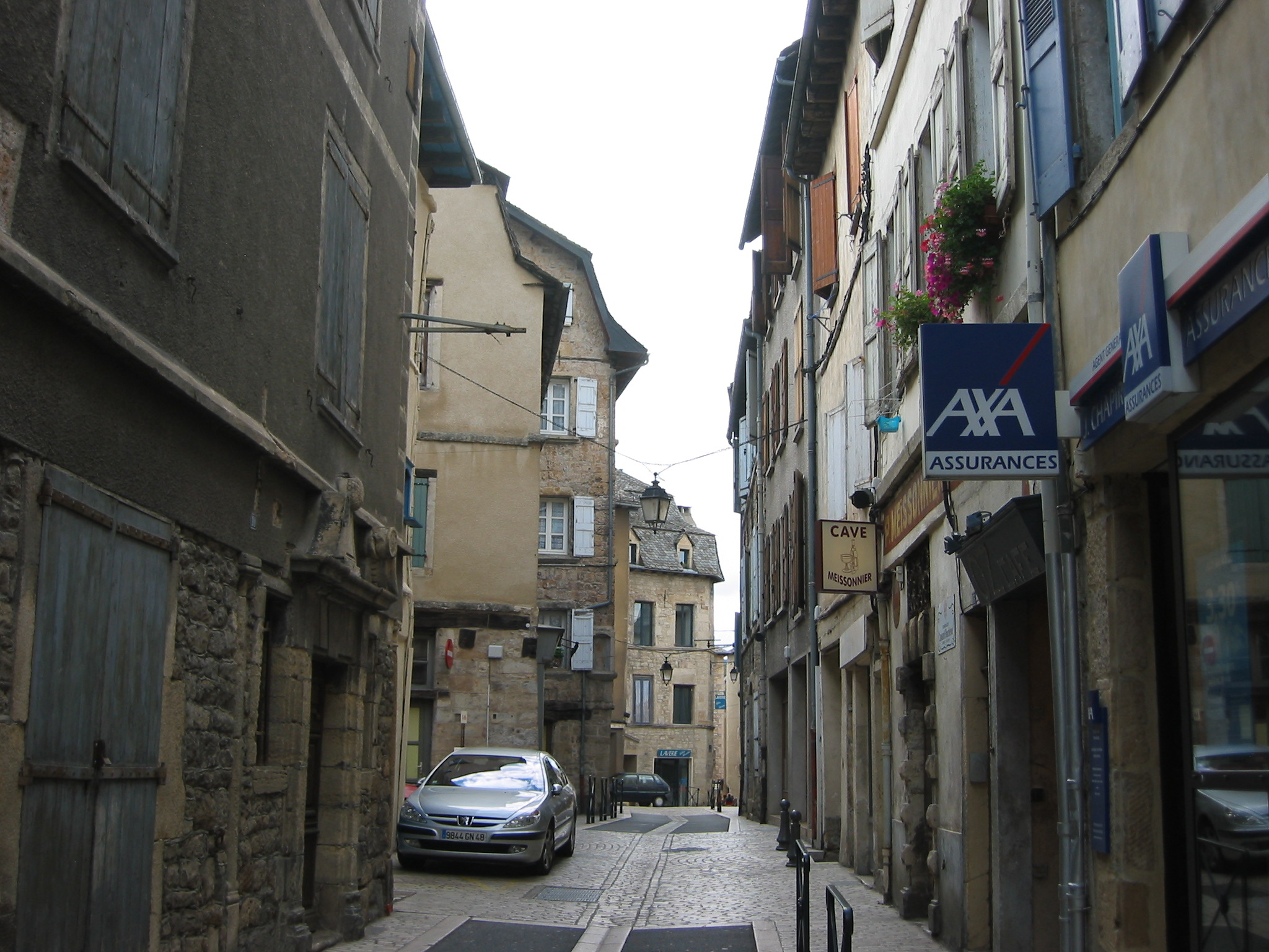 Mende (Lozère, France) - La rue basse dans la vieille ville.